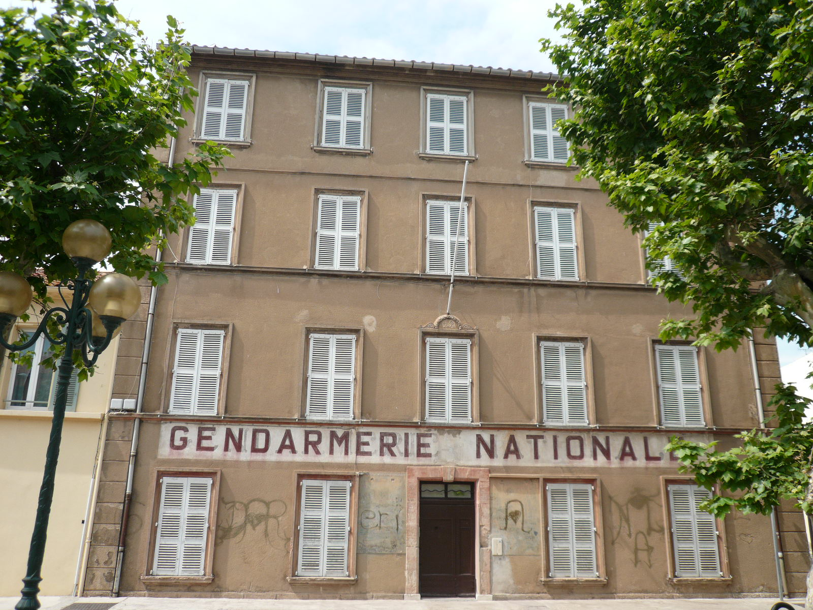 Saint-Tropez (Var, France) - Ancien bâtiment de la Gendarmerie Nationale.